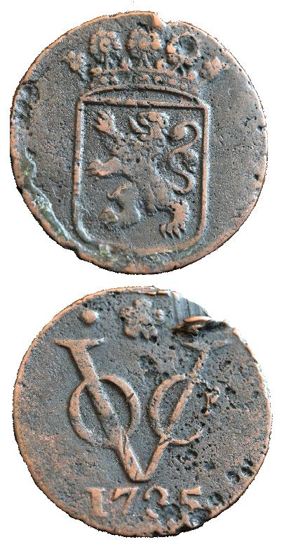 VOC duit 20 april 2006